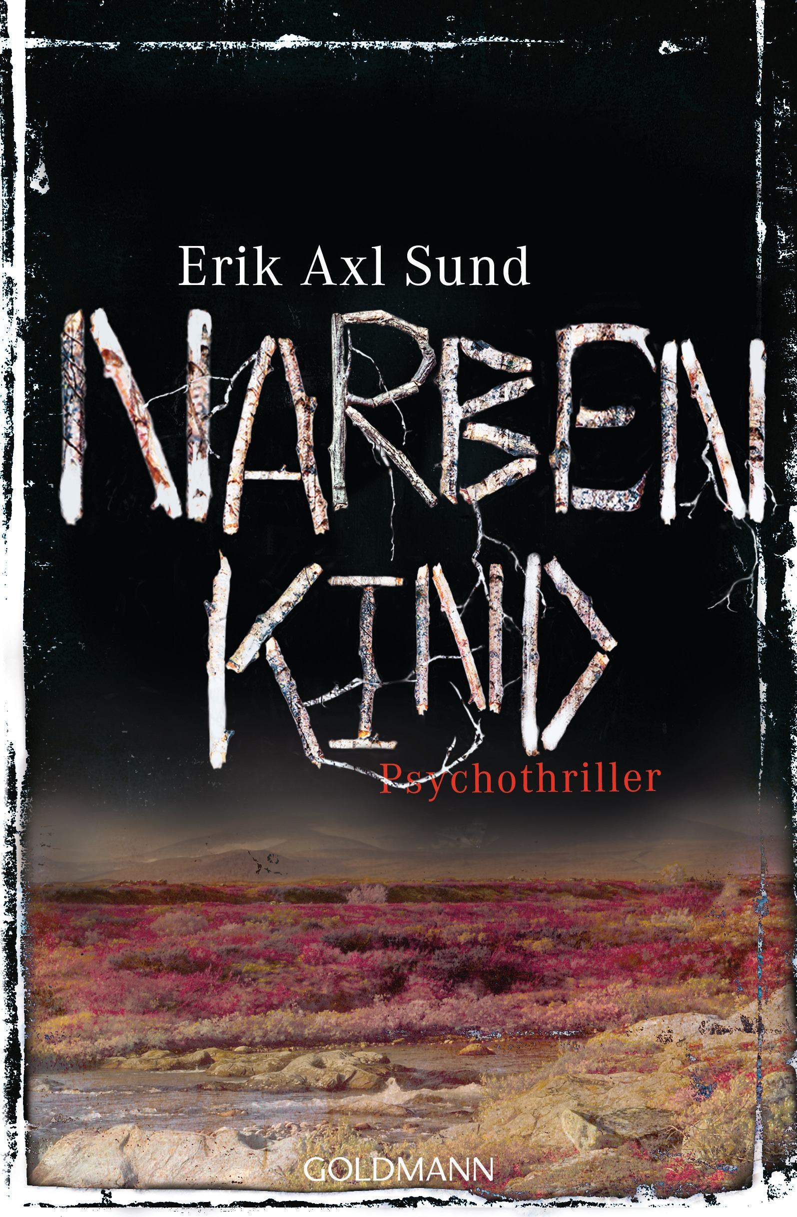 Erik Axl Sund: Narbenkind. Goldmann, München 2014. DNB